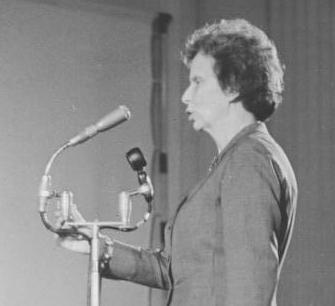 Zentralbild Brüggmann 12.7.1963 1. Strafsenat setzte Verhandlung gegen Globke fort. Der 1. Strafsenat des Obersten Gerichts der DDR setzte am 11. Juli 1963 die Hauptverhandlung gegen den millionenfachen Judenmörder Globke fort. Im Mittelpunkt steht der Komplex der berüchtigten "Endlösung der Judenfrage". Wie am Vortage sagten zahlreiche Zeugen aus, die die faschistische Judenverfolgung am eigenen Leibe erlebten. UBz: Die Zeugin, die Juristin Gertruda Sekaninová-Čakrtová aus Prag, Überlebende von Theresienstadt, Auschwitz und Kurzbach, die ihre Angehörigen im Holocaust verlor.